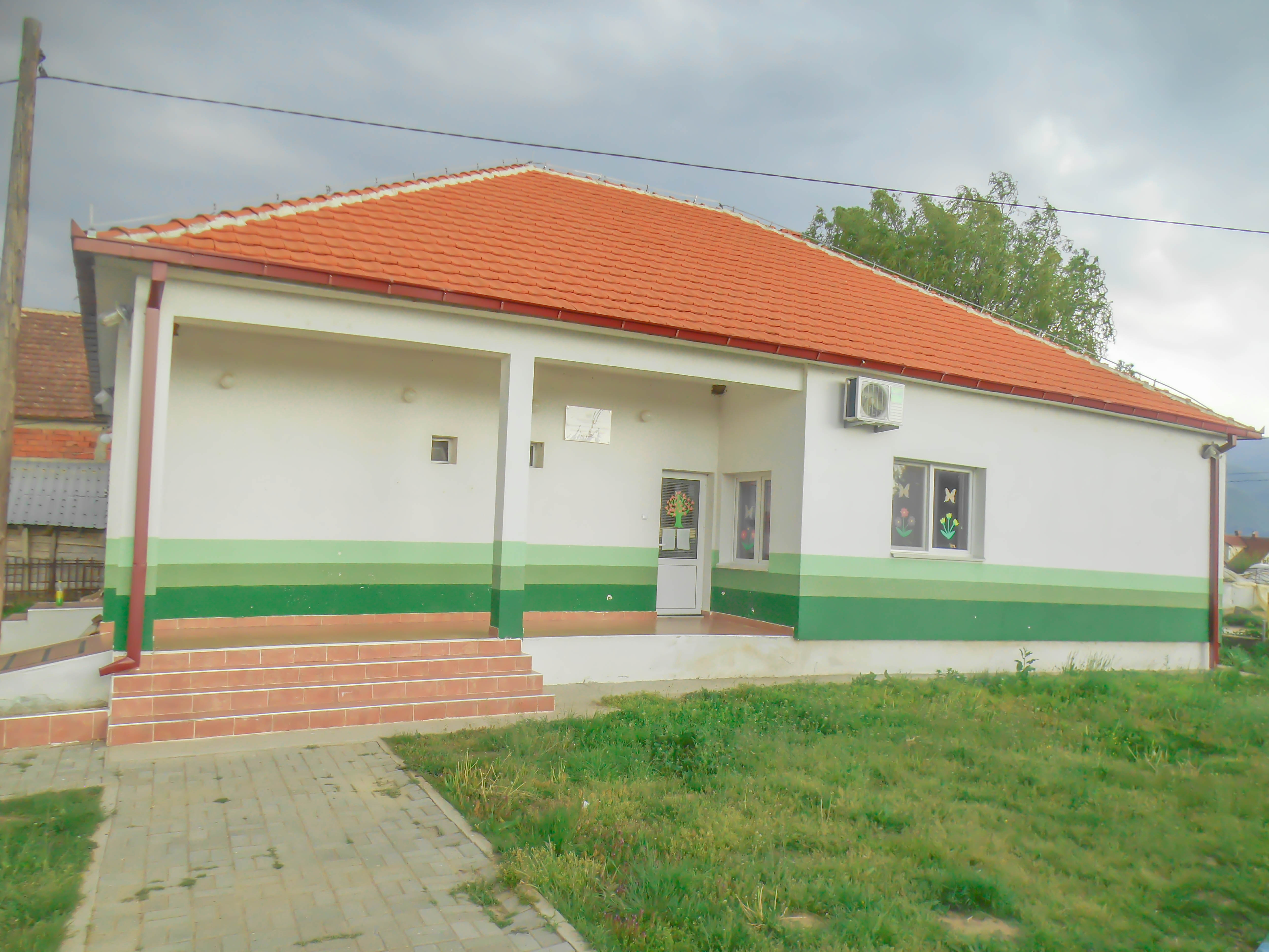 Детска градинка - Моноспитово